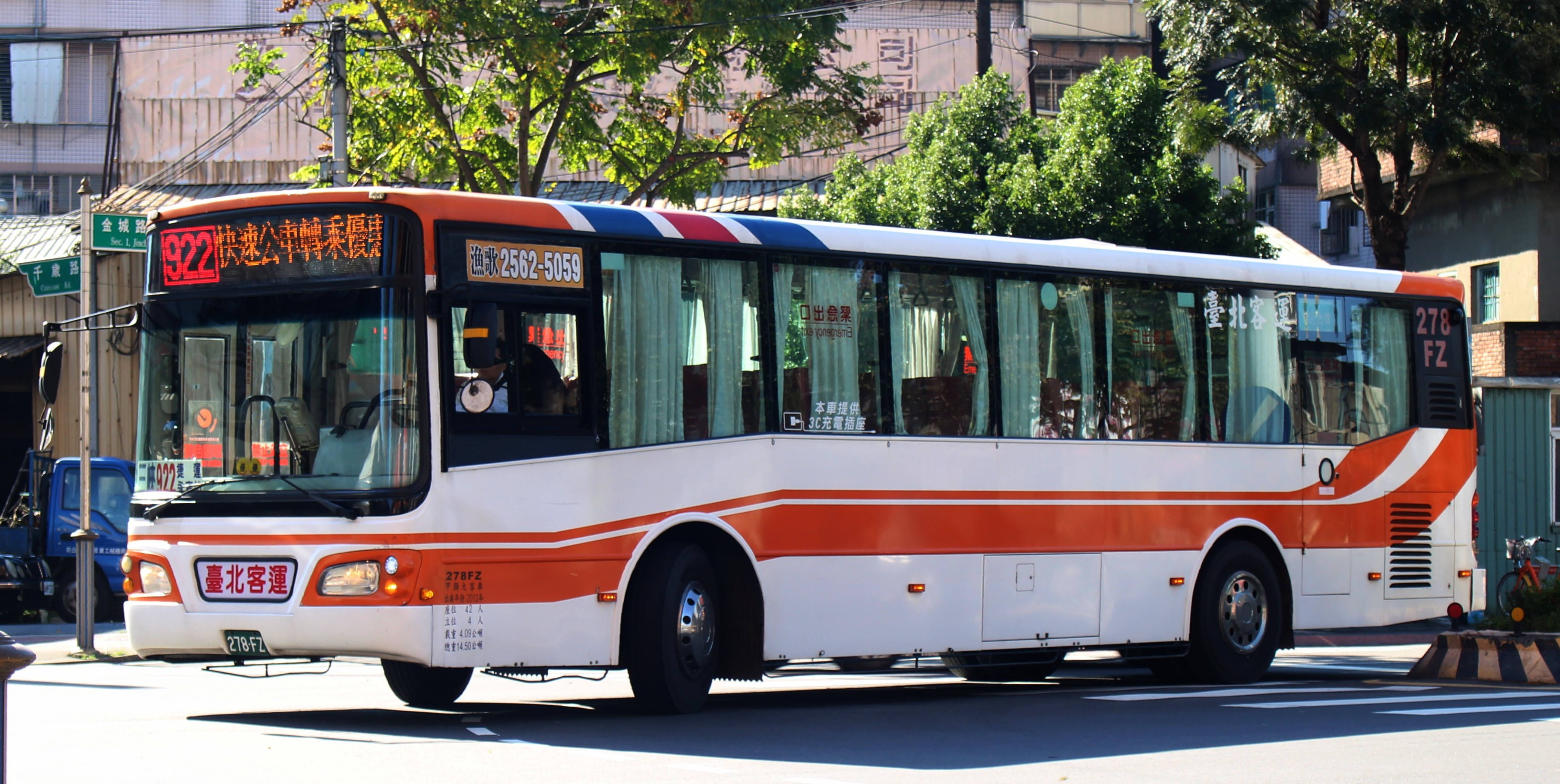 台北客運2012 HINO RK8JRSA 278-FZ 922